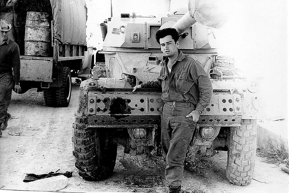 פעולת כראמה. אבנר חרמוני עם השריונית (הגלגל השמאלי כבר הוחלף ) שנפגעה מפגז ח"ש שנורה מפטון ירדני בפעולת כראמה.